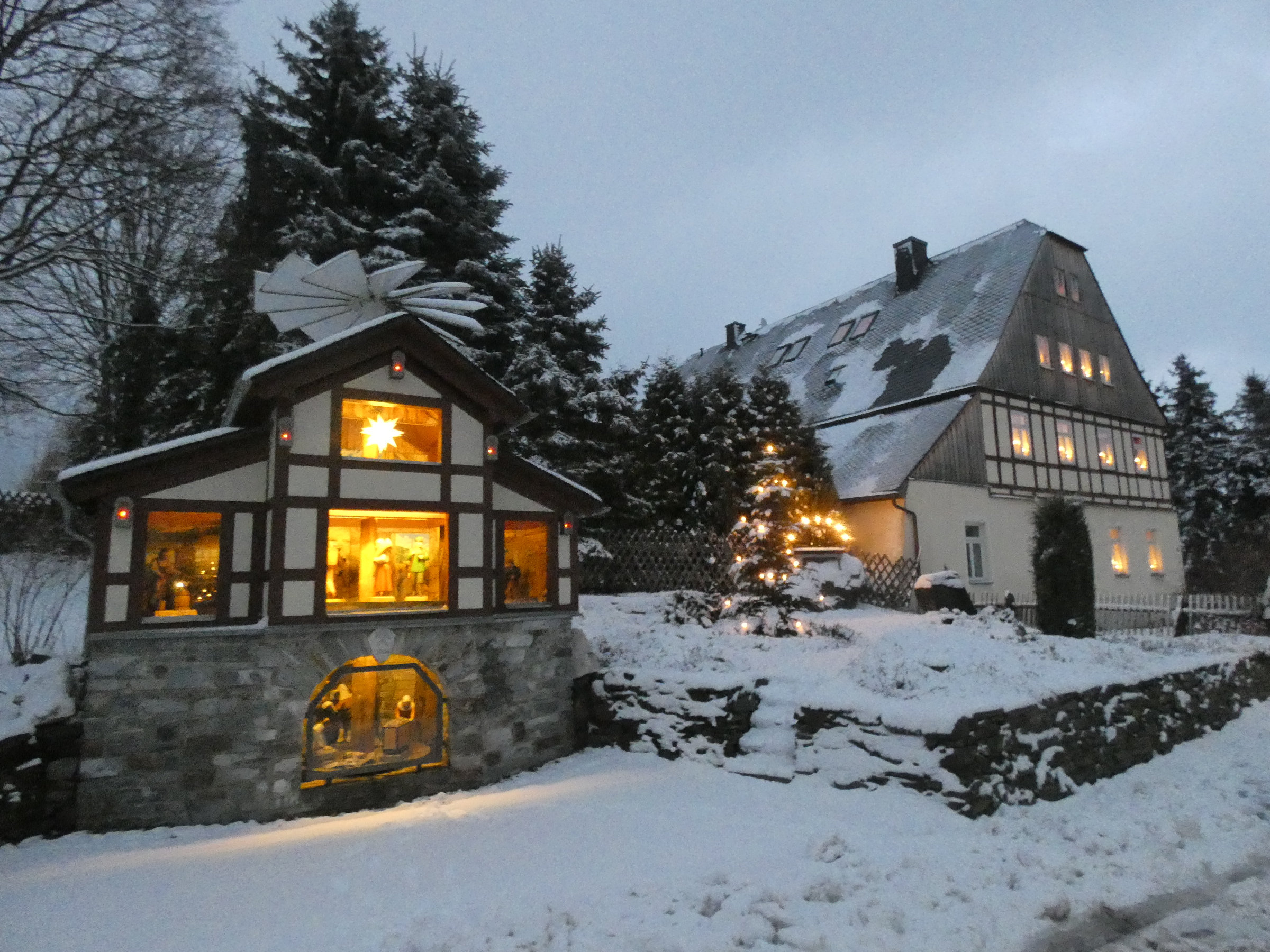 Anschieben jedes Jahr am Samstag vor dem 1. Advent.